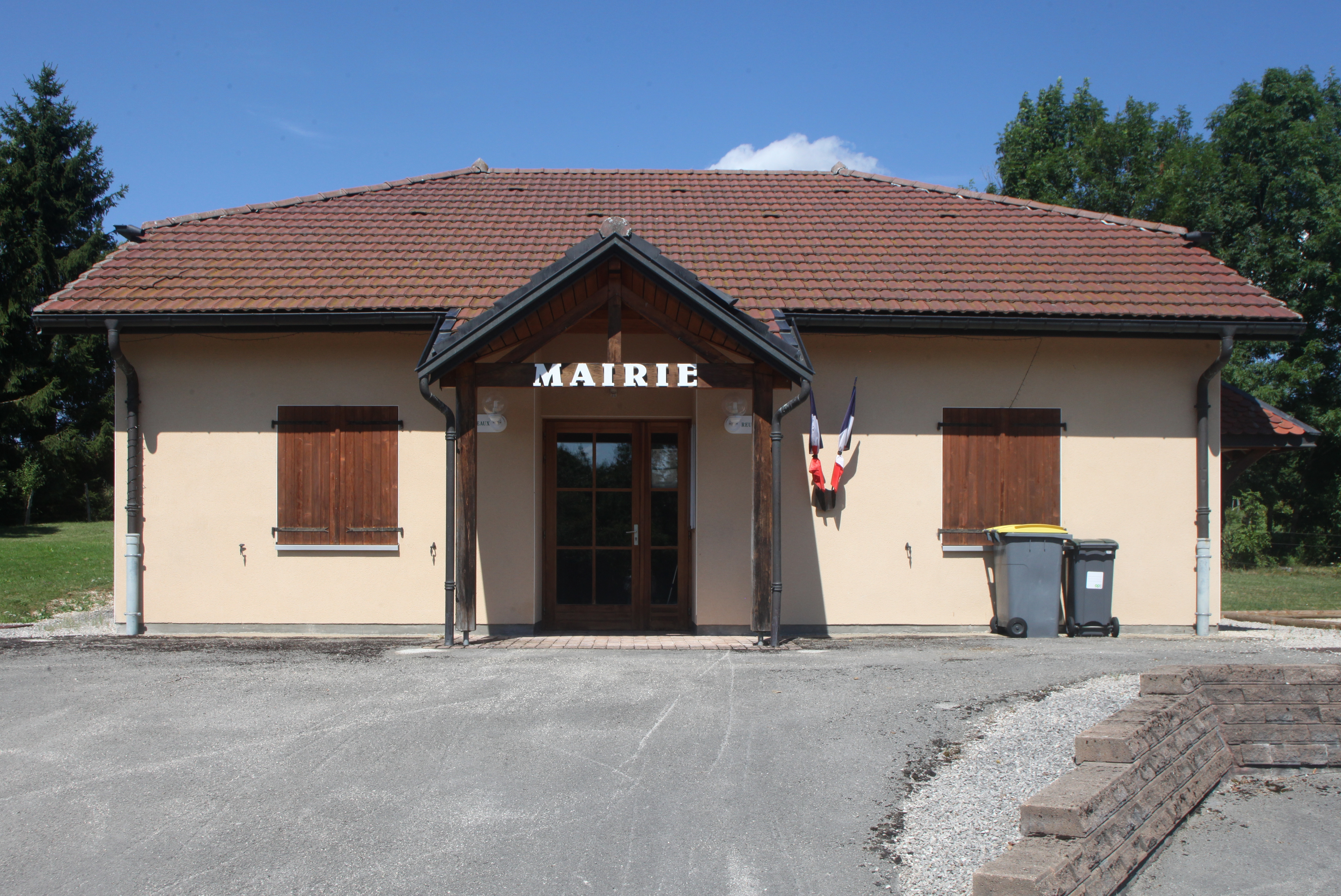 Mairie de Renédale (Doubs).